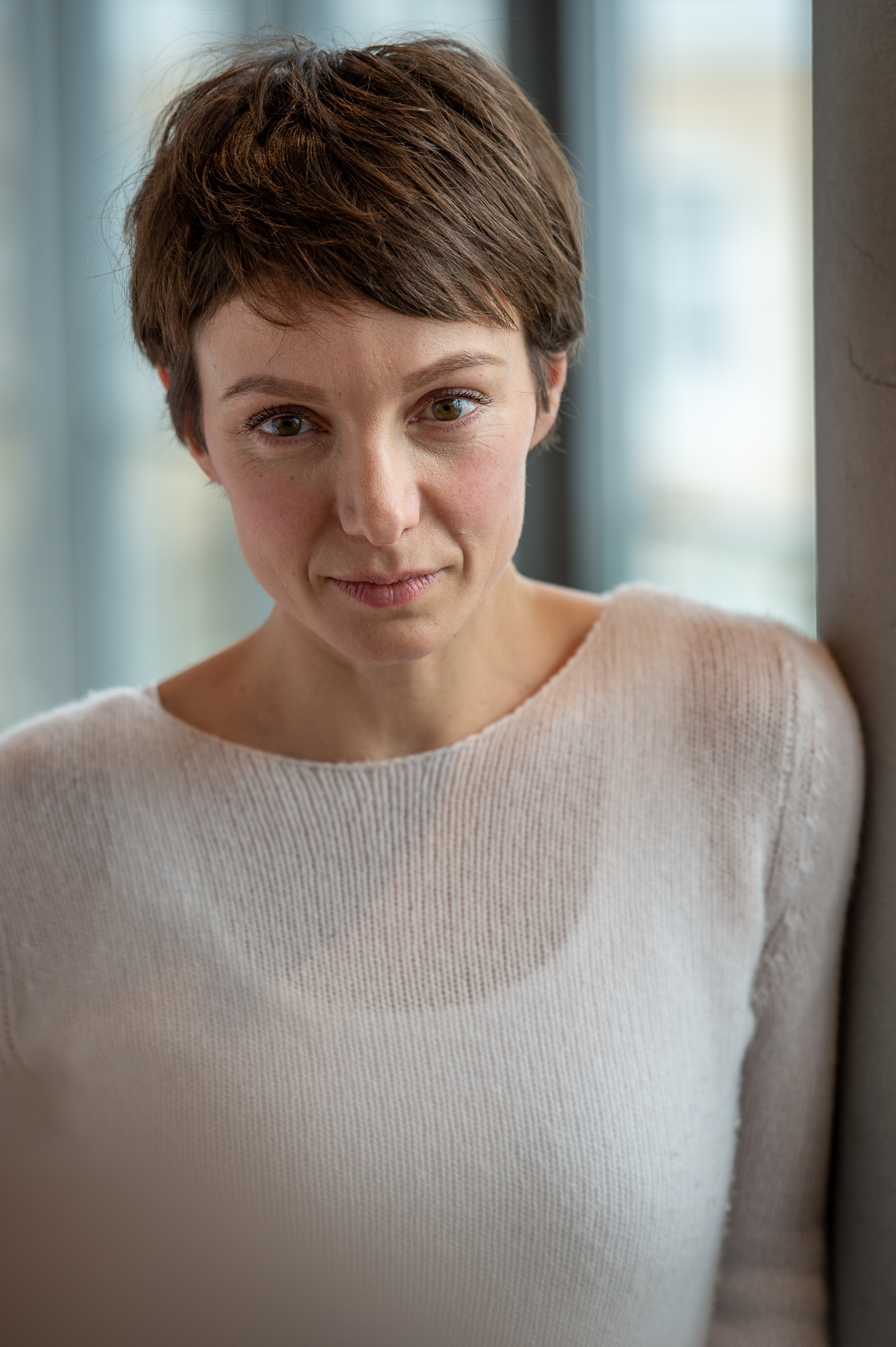 BR,Bayerischer Rundfunk,Bayerisches Fernsehen,Filmbrunch 2019,Julia Koschitz,Literaturhaus München